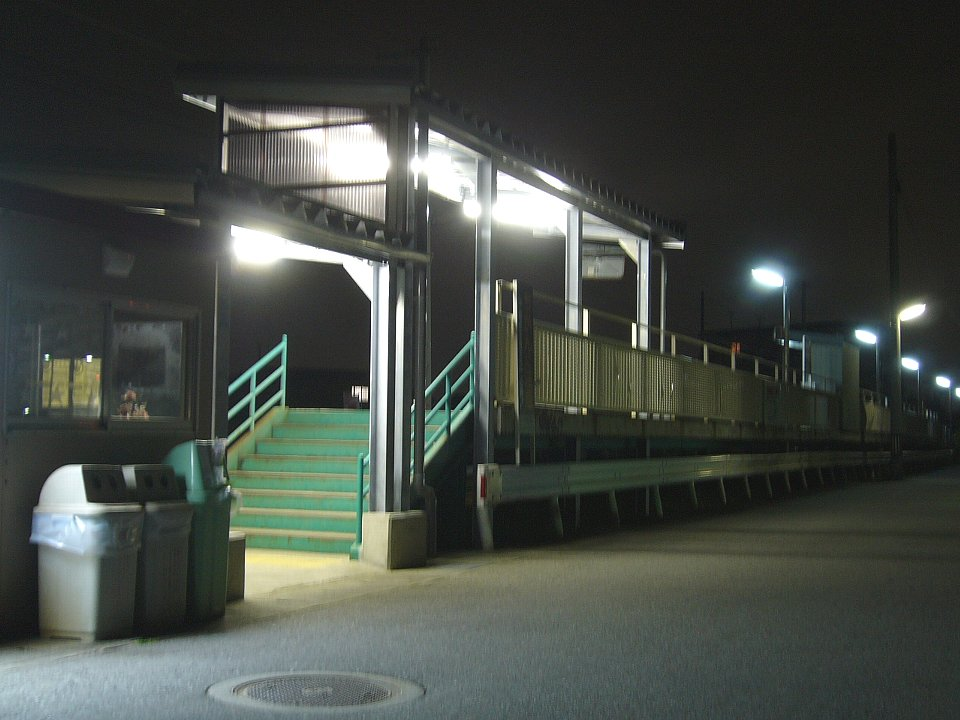 富山地方鉄道小杉駅